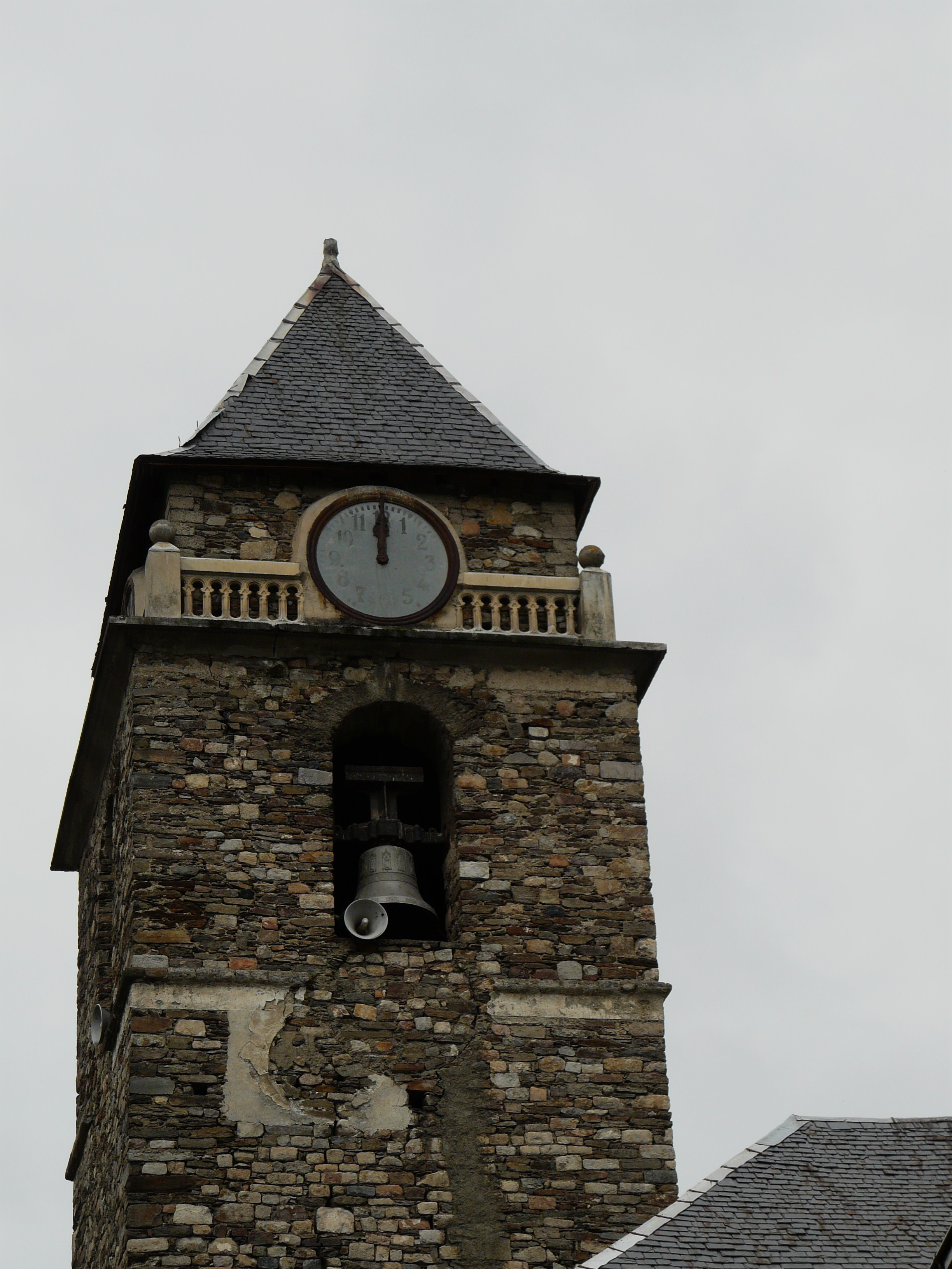 Le clocher de l'église de Les, Val d'Aran, Catalogne, Espagne.